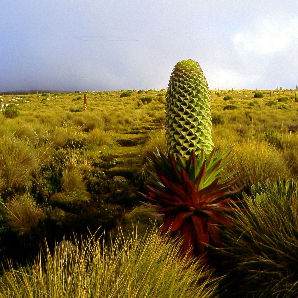 Giant lobelia (Lobelia deckenii)